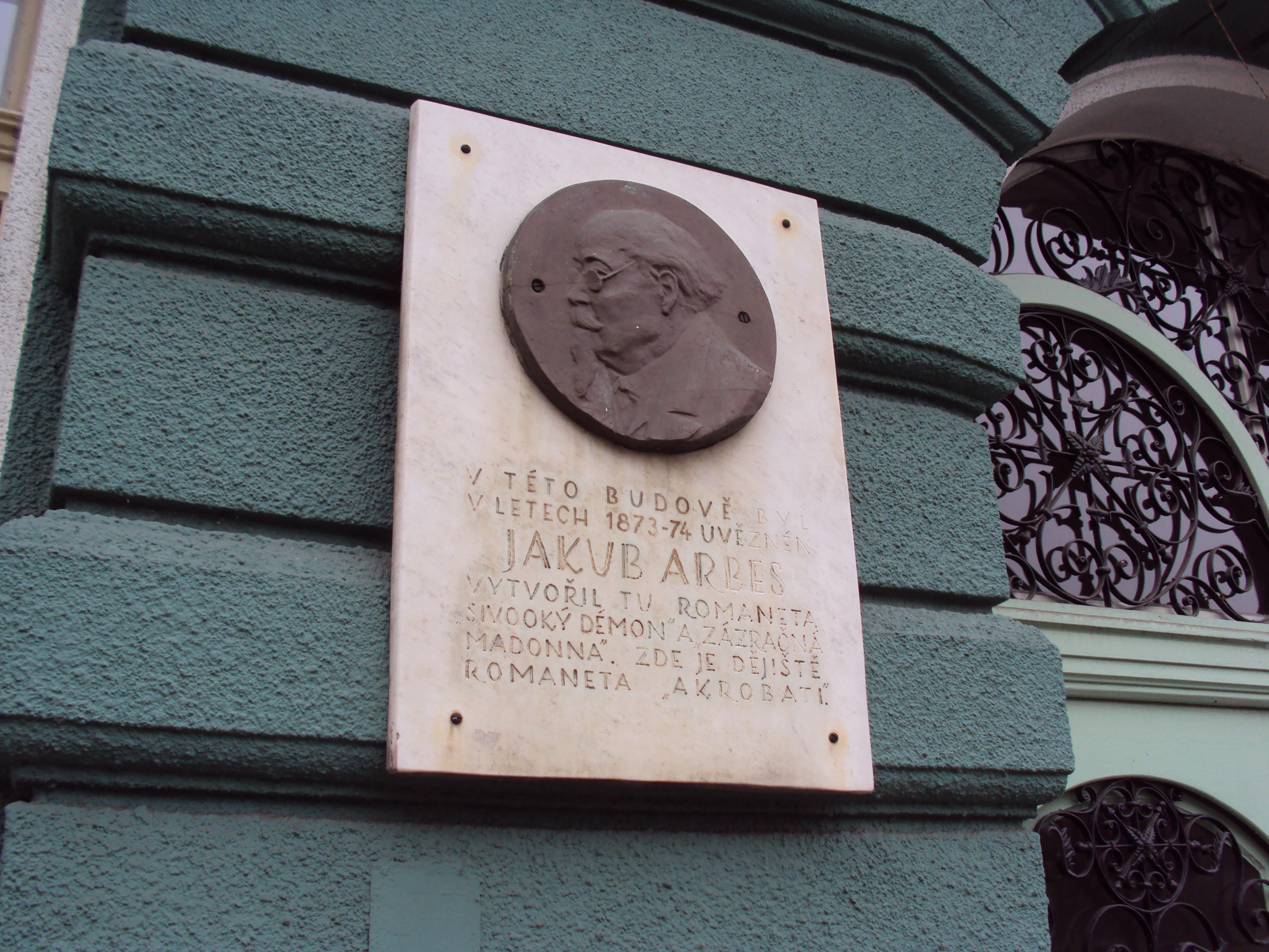 Deska na Arbesově škole připomínající jeho zdejší uvěznění